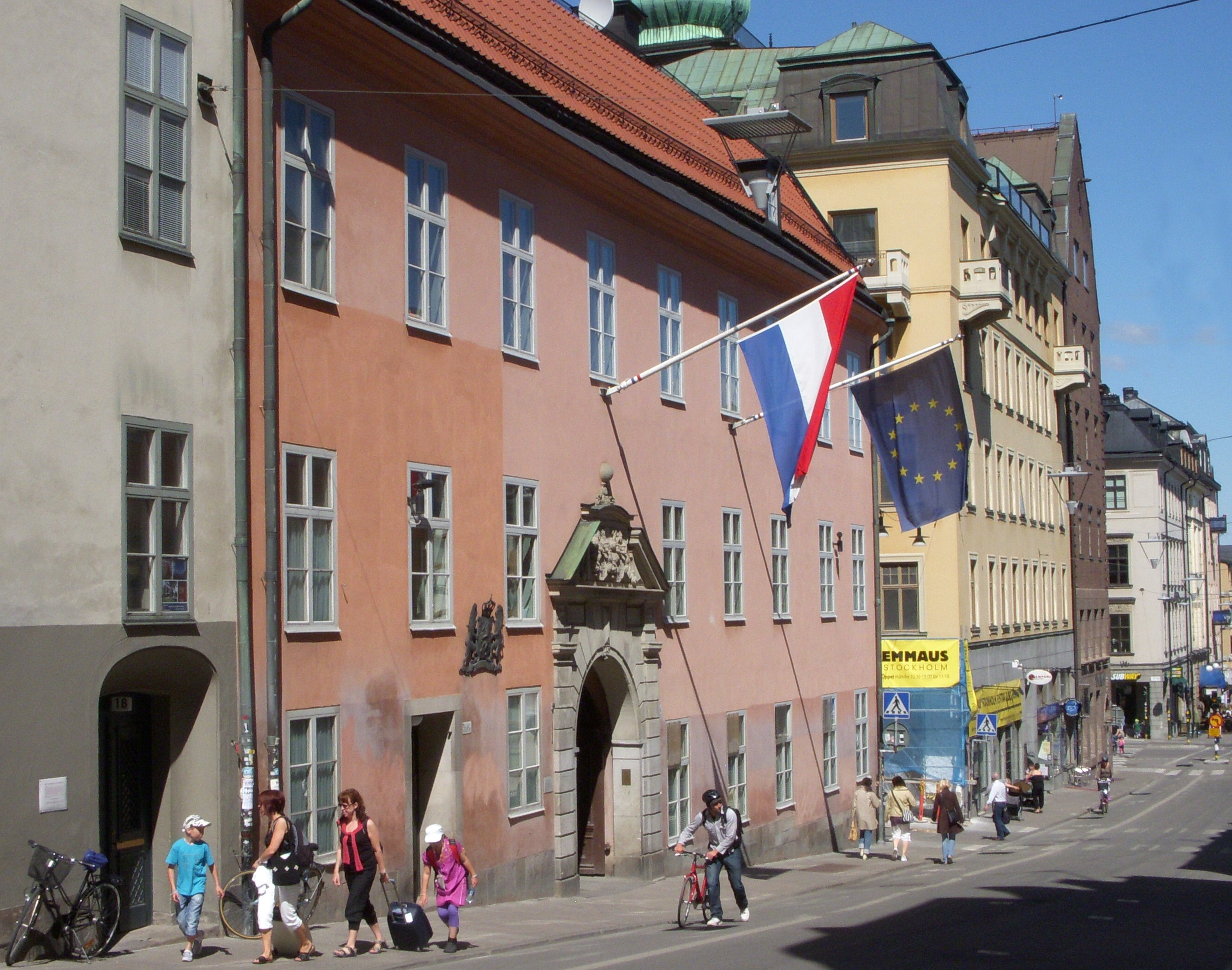 Louis De Geers palats, fasad mot Götgatan, Stockholm